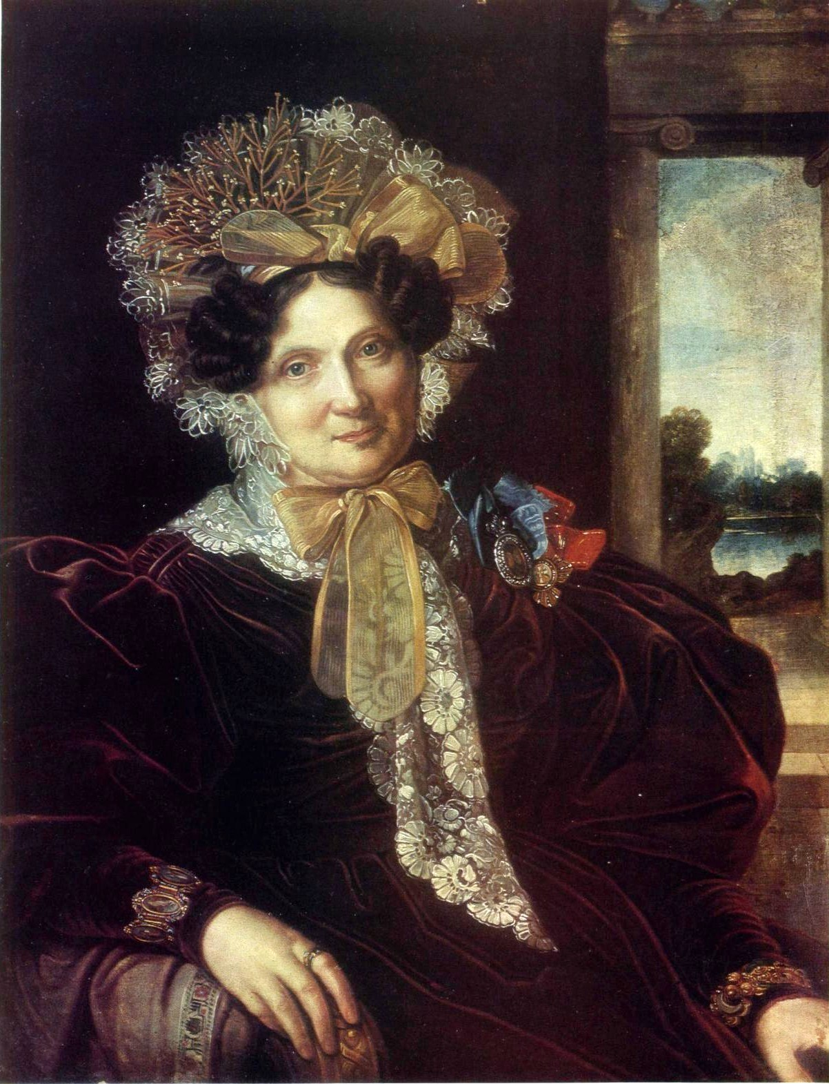 Мария Васильевна Кочубей, урождённая Васильчикова (1779-1844), статс-дама, жена В.П.Кочубея.